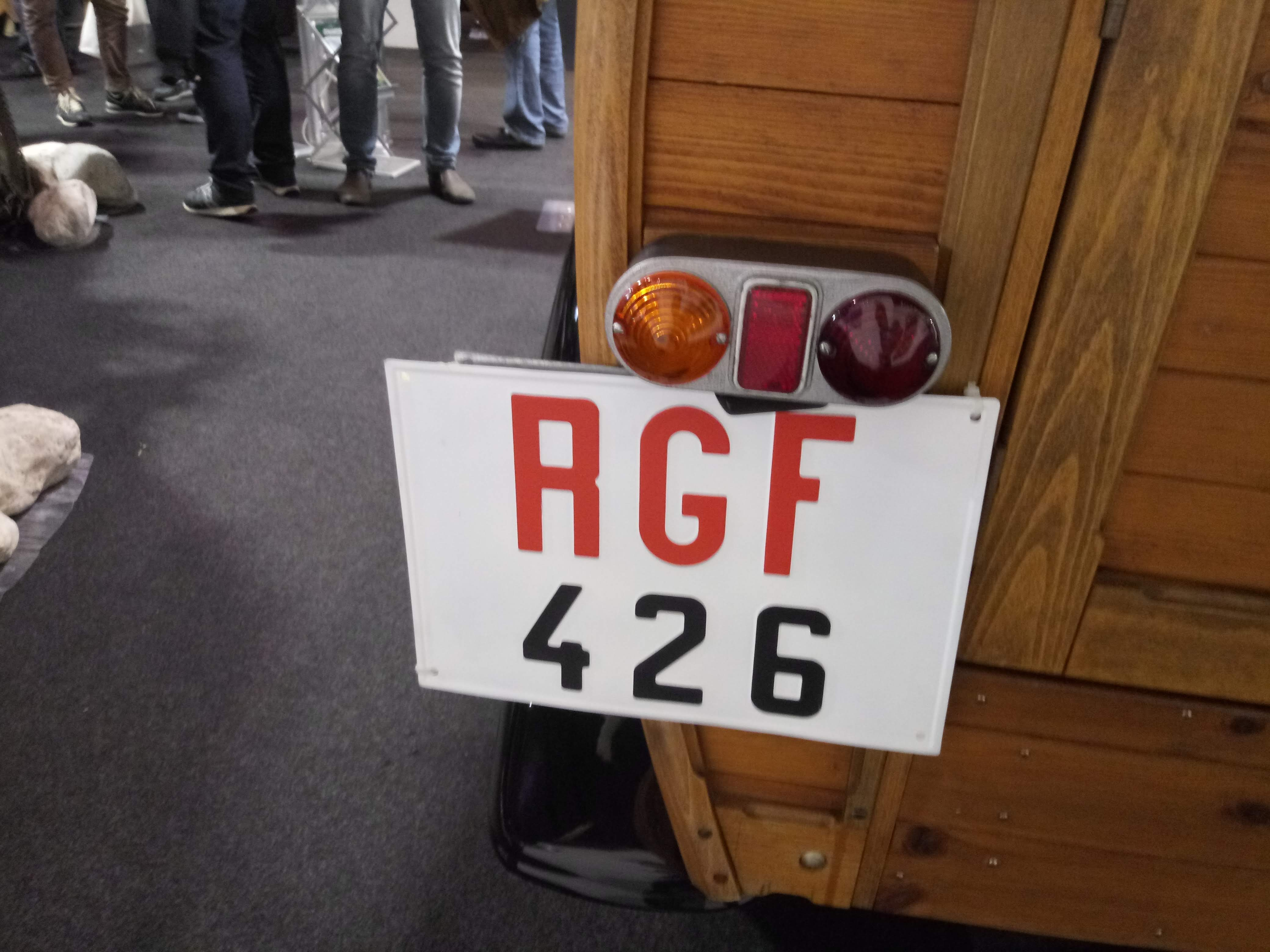 La foto rappresenta la targa posteriore di un furgone della Regia Guardia di Finanza, corpo che diventerà negli anni '50 l'attuale Guardia di Finanza. E' stata scattata nel padiglione 7 della fiera "Auto e moto d'epoca a Padova" il 26/10/2019